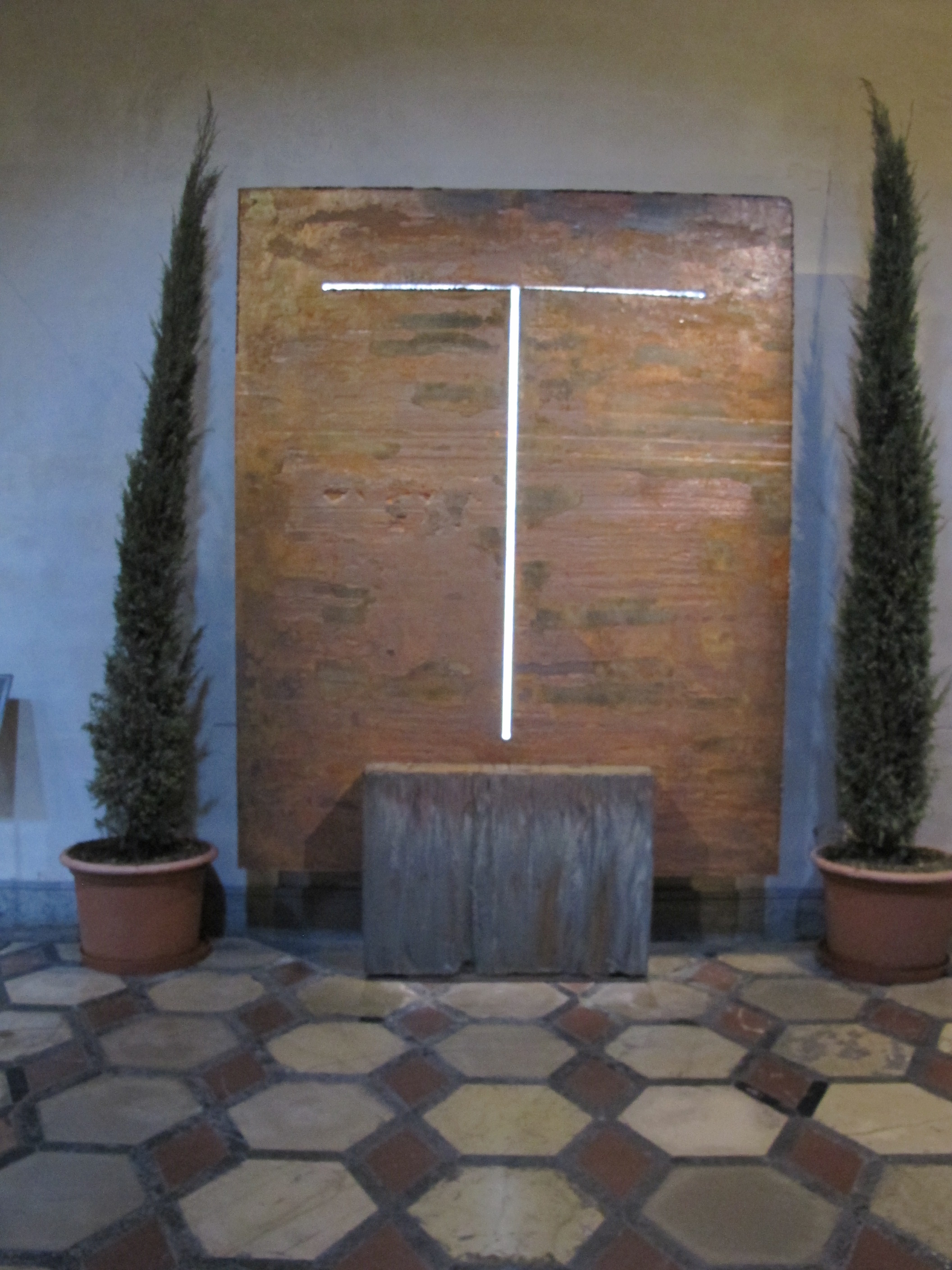 Duomo di prato, interno 05 tomba vescovo fiorelli